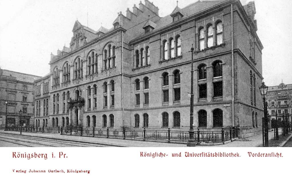 Königsberg